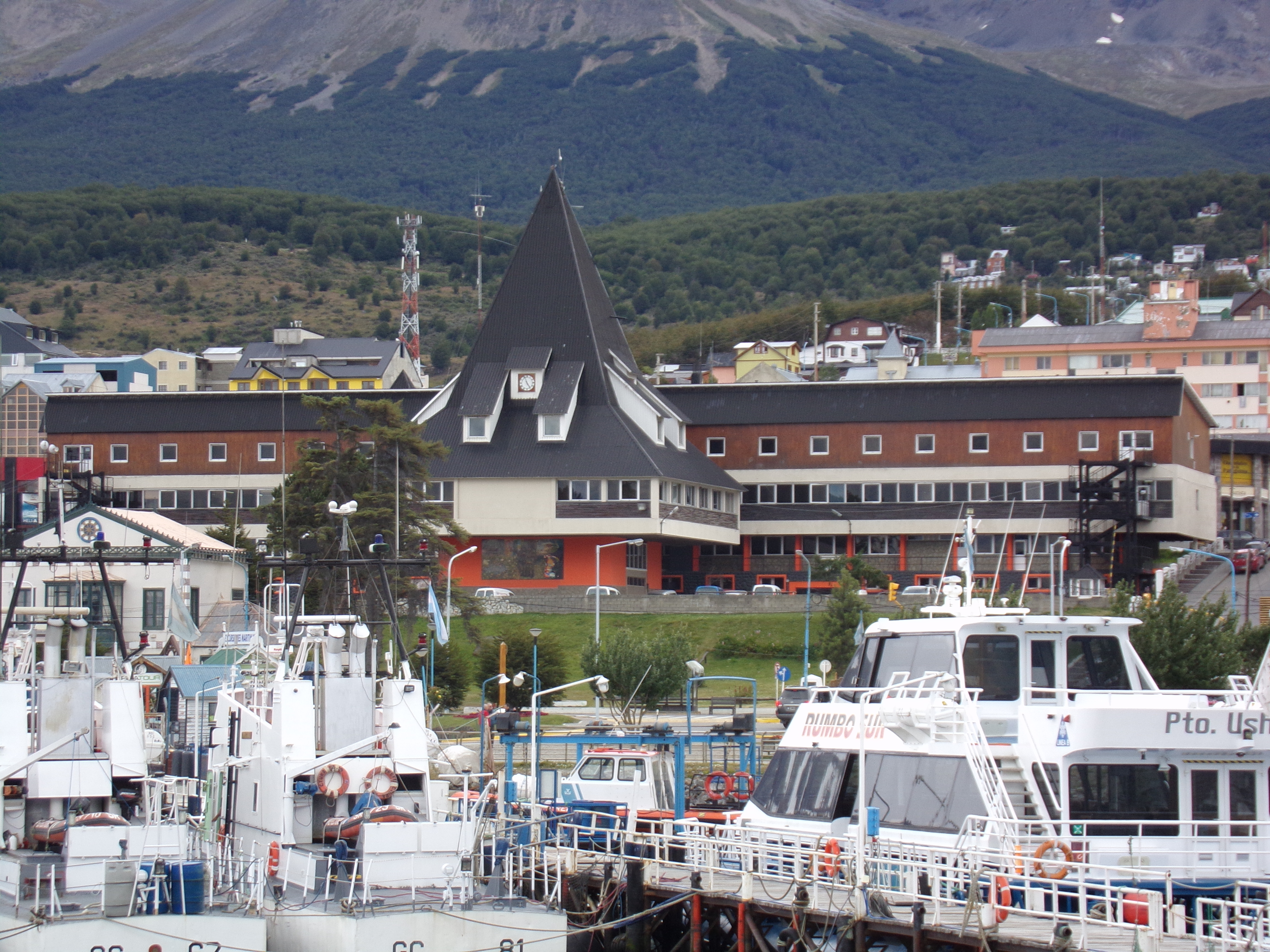 Casa de Gobierno de Tierra del Fuego, Antártida e Islas del Atlántico Sur en Ushuaia